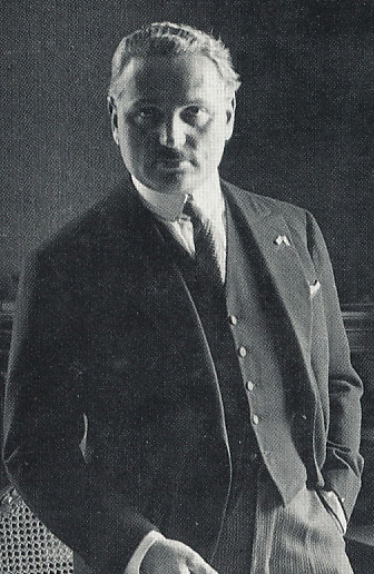 Ritratto di Arturo Osio, fondatore della Banca Nazionale del Lavoro